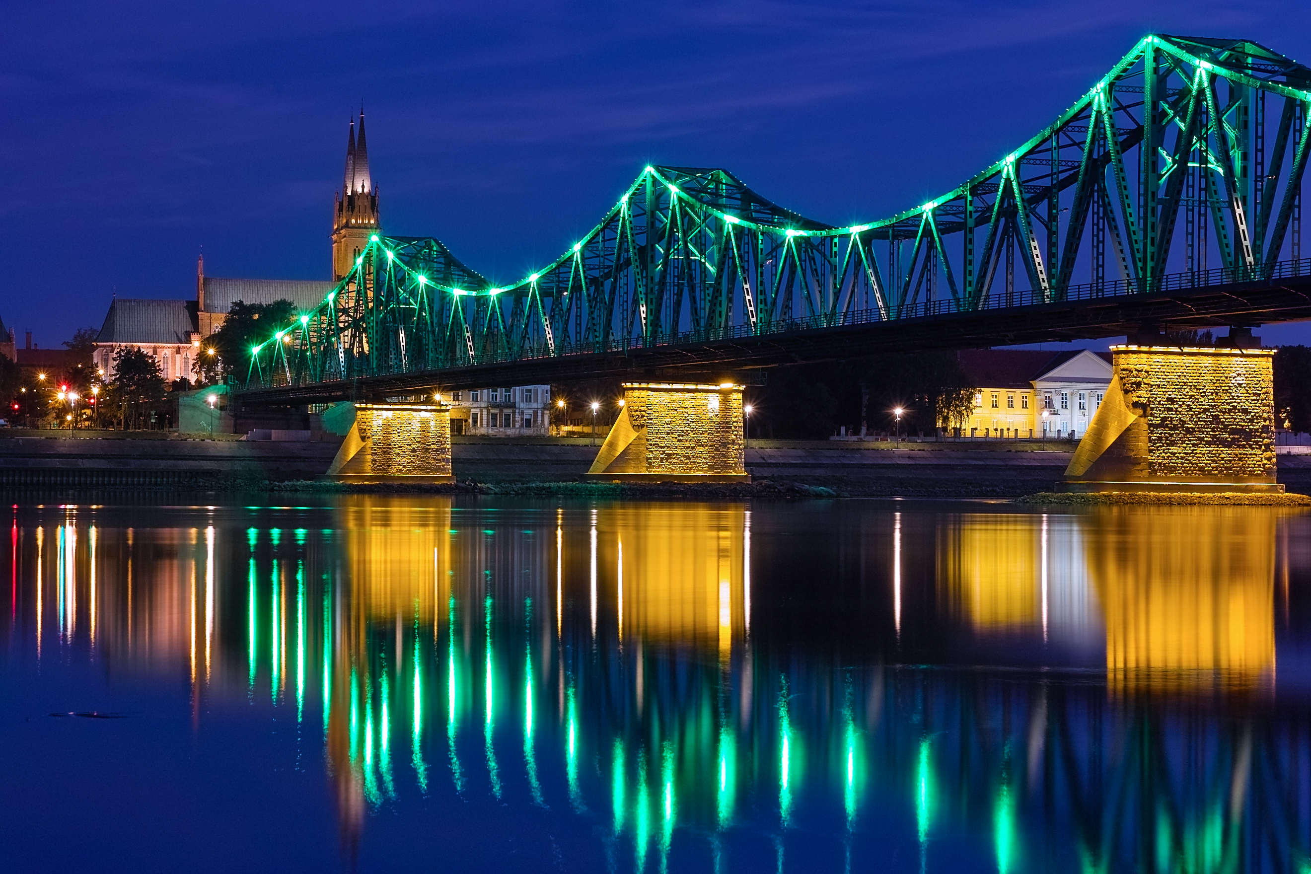 Włocławek – katedra, most, pałac biskupi